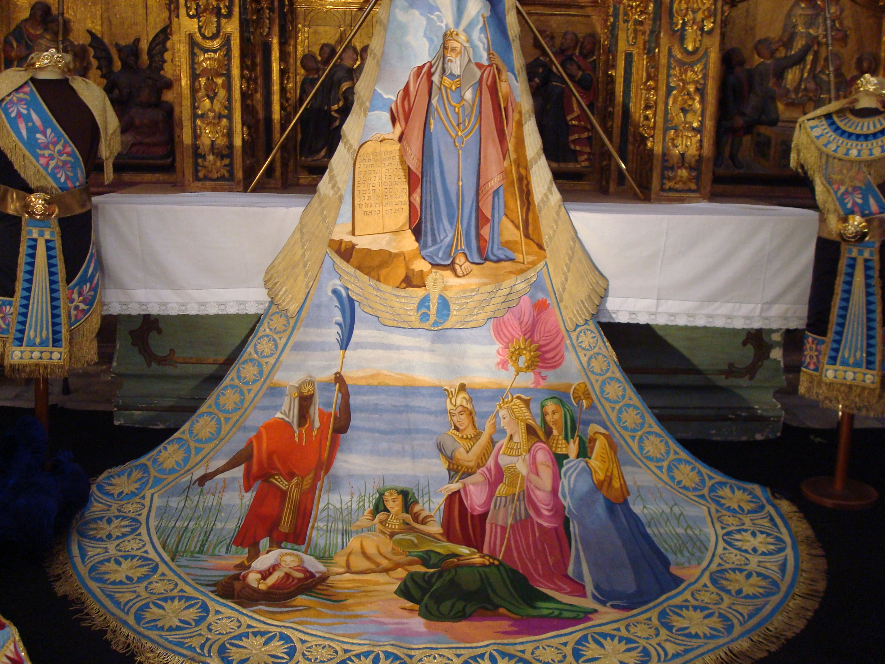 Manto que representa a Moisés con las Tablas de la Ley y a Moisés siendo rescatado de las aguas del Nilo. Manto bordado a mano por bordadoras lorquinas, Semana Santa Lorca